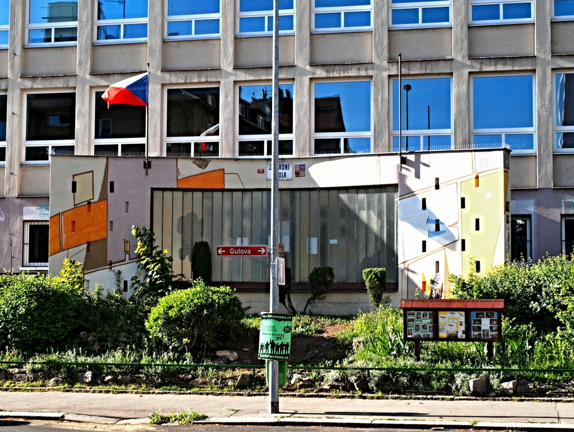 ZŠ Gutova